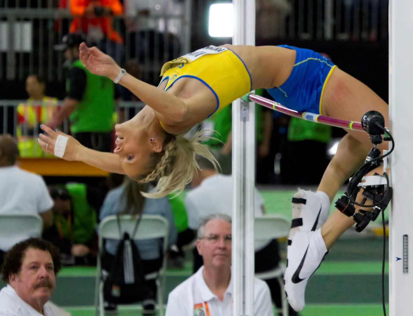 5074 kinsey